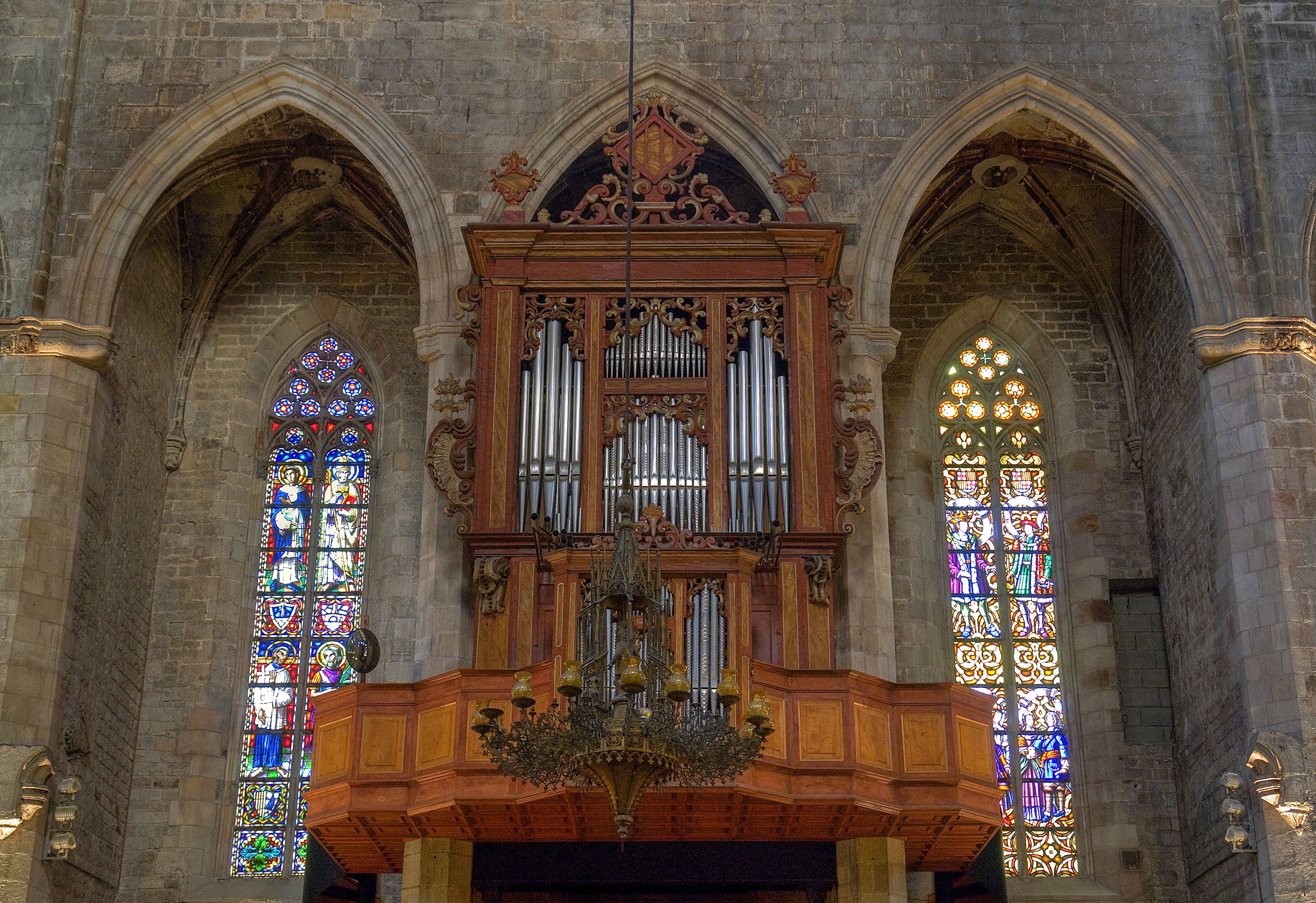 Orgue de La Basílica De Santa Maria Del Mar.